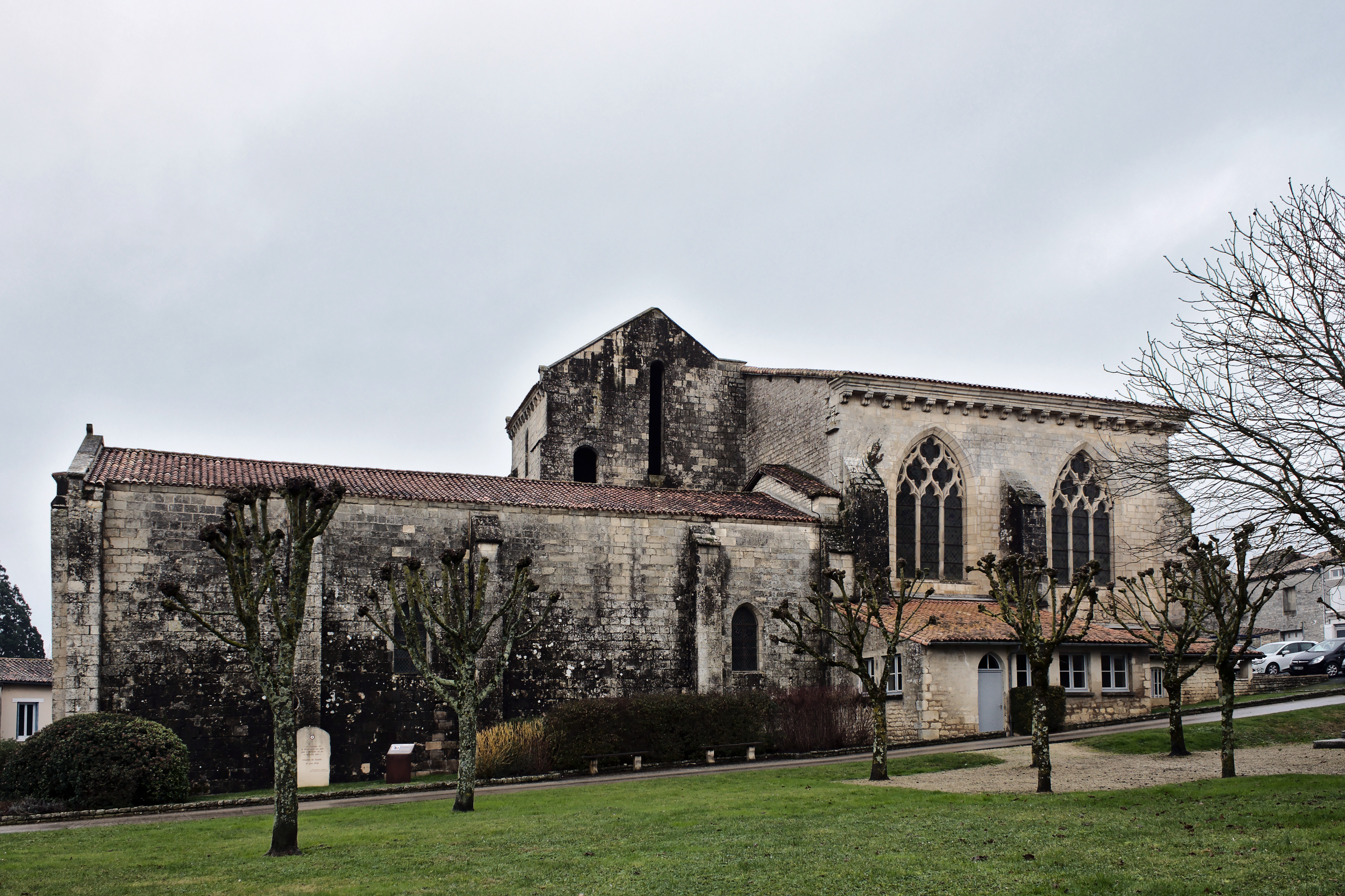 Église Saint-Martin de Périgné.